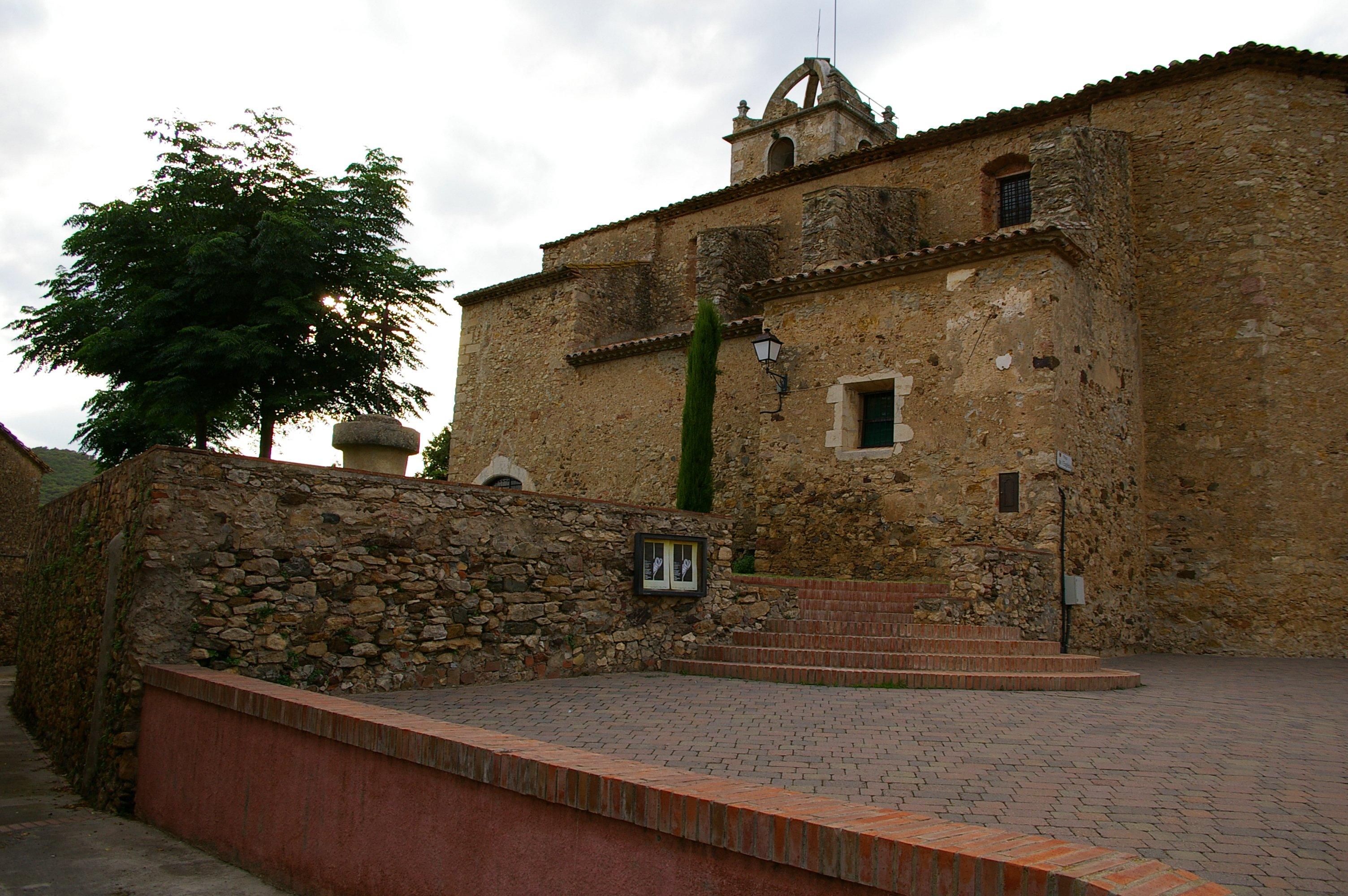 Església de Sant Fruitós en Llofriu (Palafrugell).